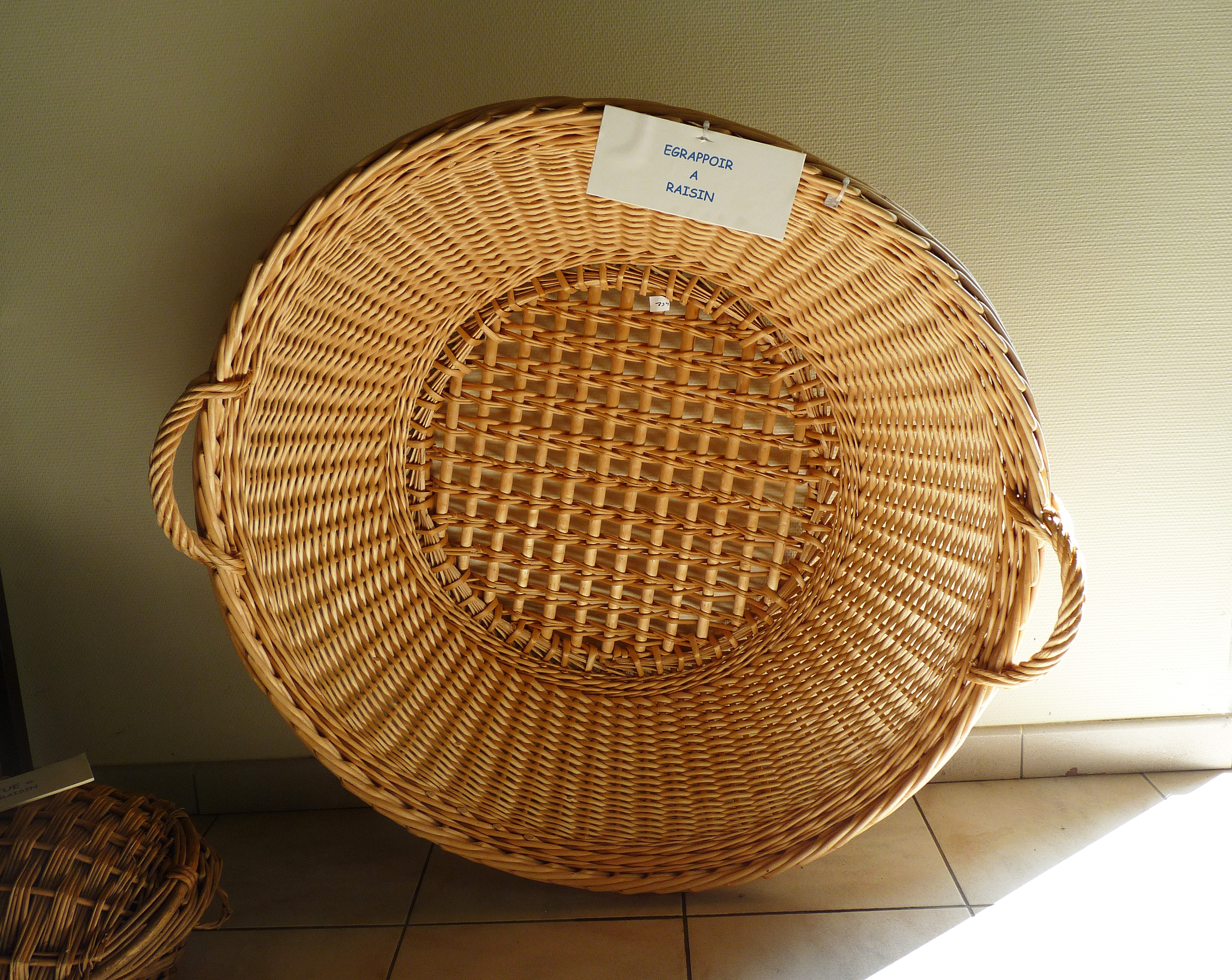 Egrappoir à raisin à la Maison de la Vannerie (Fayl-Billot, Haute-Marne)